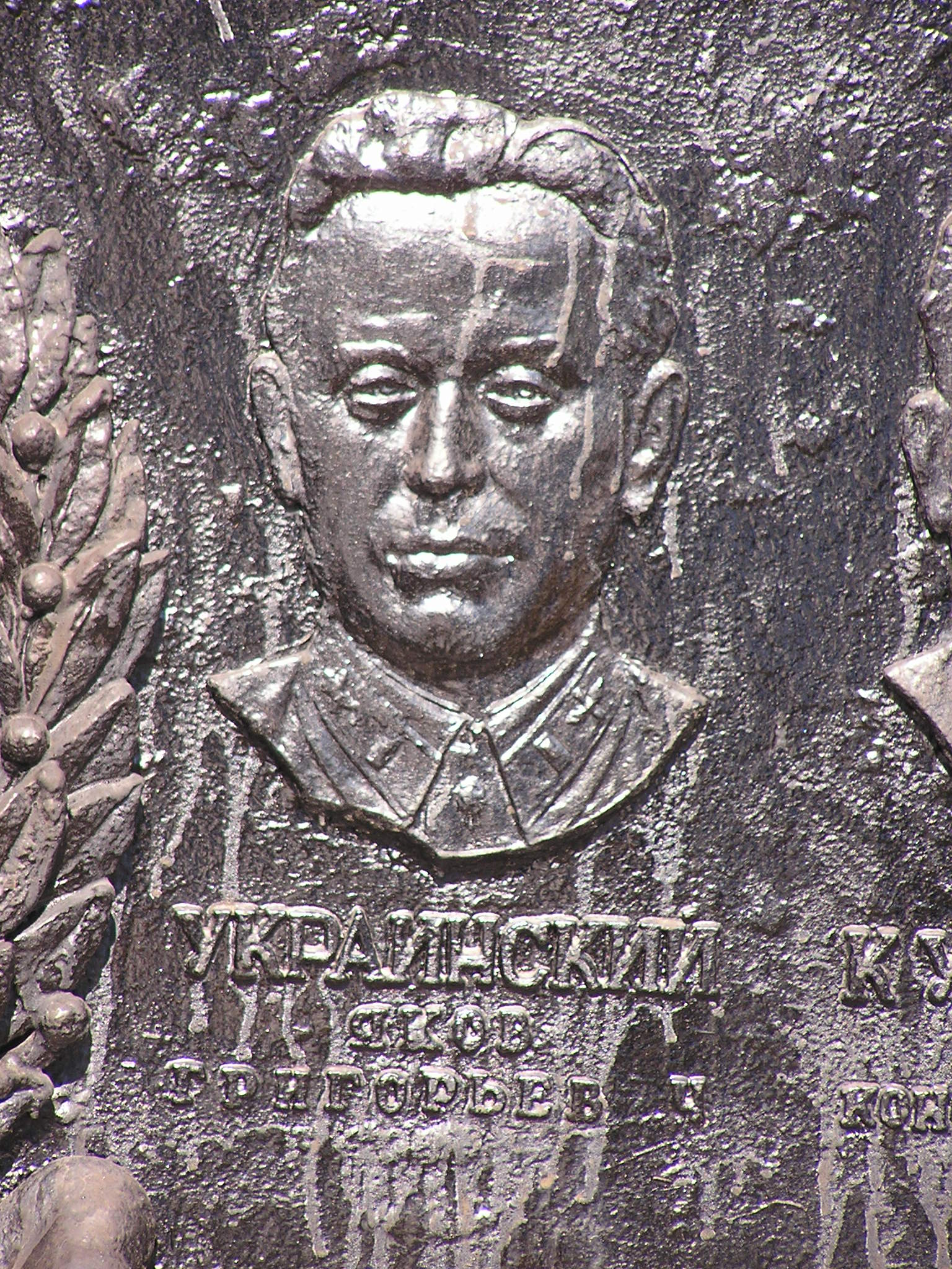 Донецк. Украинский